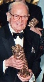 Georges Cravenne à la cérémonie des Césars 2000.